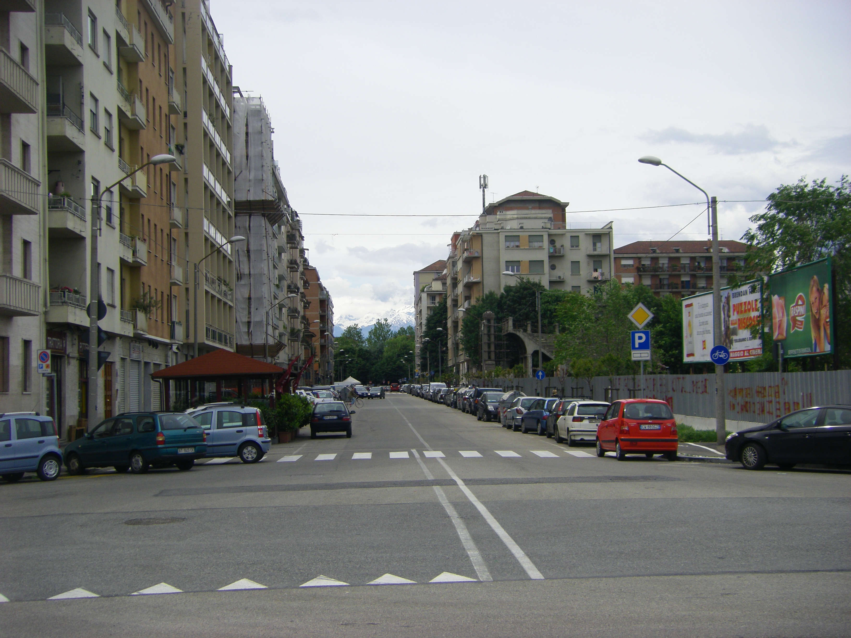 Straße vor dem Stadio Filadelfia in Turin, Italien